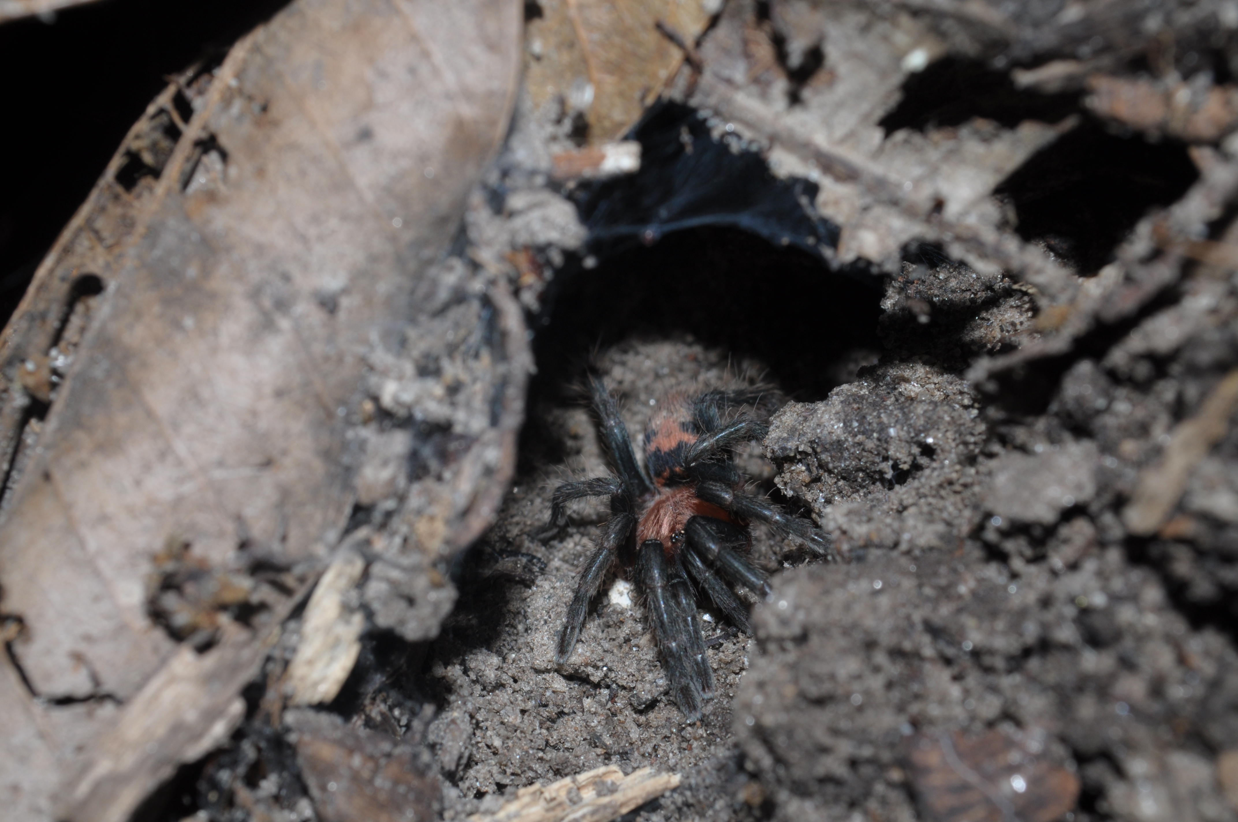 Theraphosidar Davus pentalore Jalcomulco, Veracruz